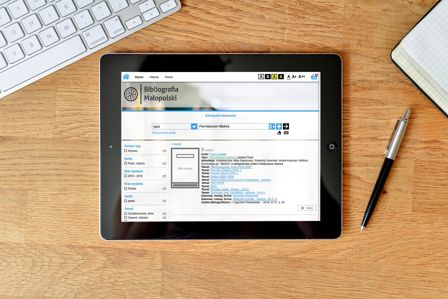 Widok tabletu z internetową bazą "Bibliografii Małopolski"